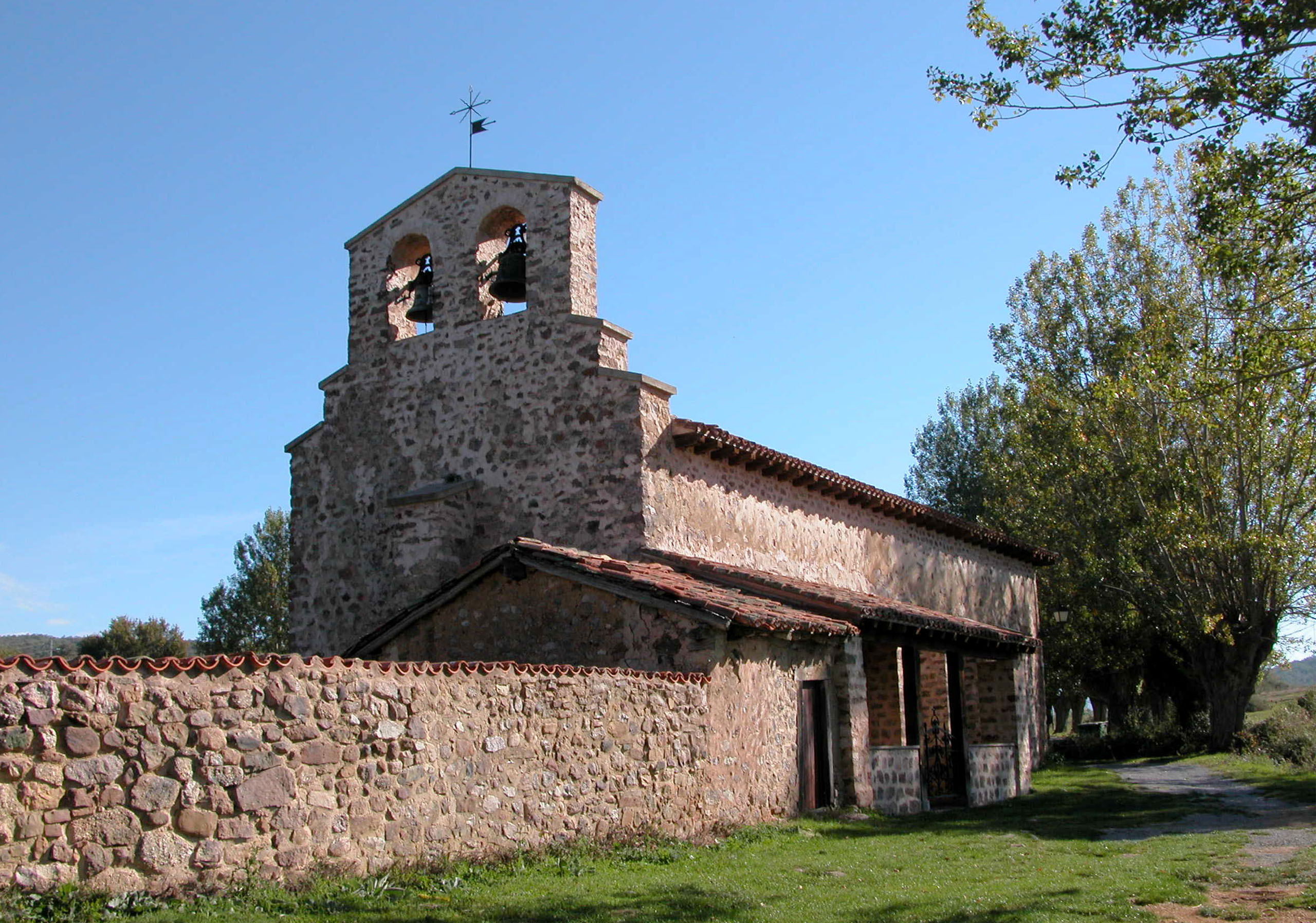 Montemediano, iglesia de la Visitación (Nieva de Cameros, La Rioja, España)